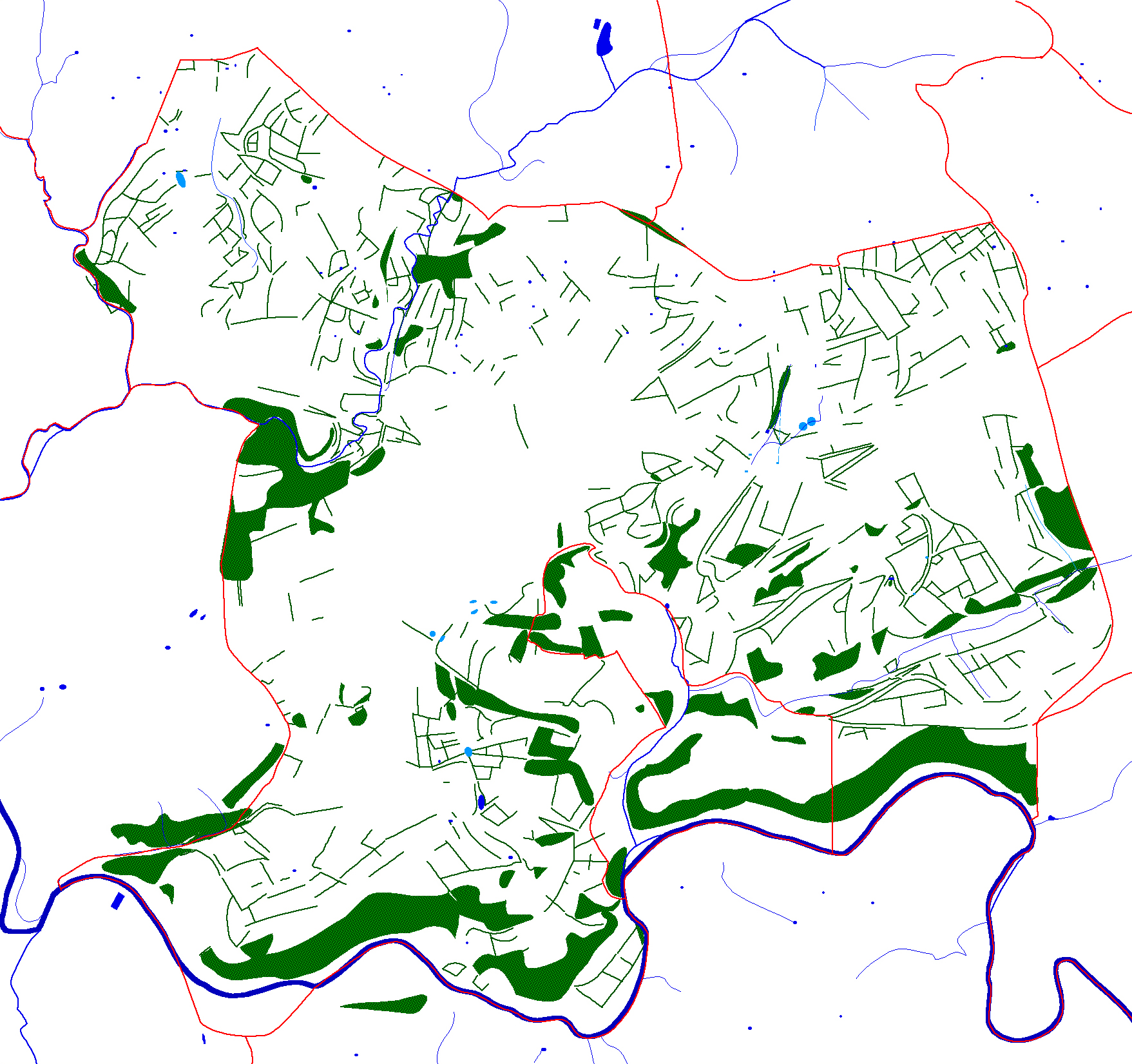 Carte de l'ecotope d'Olne